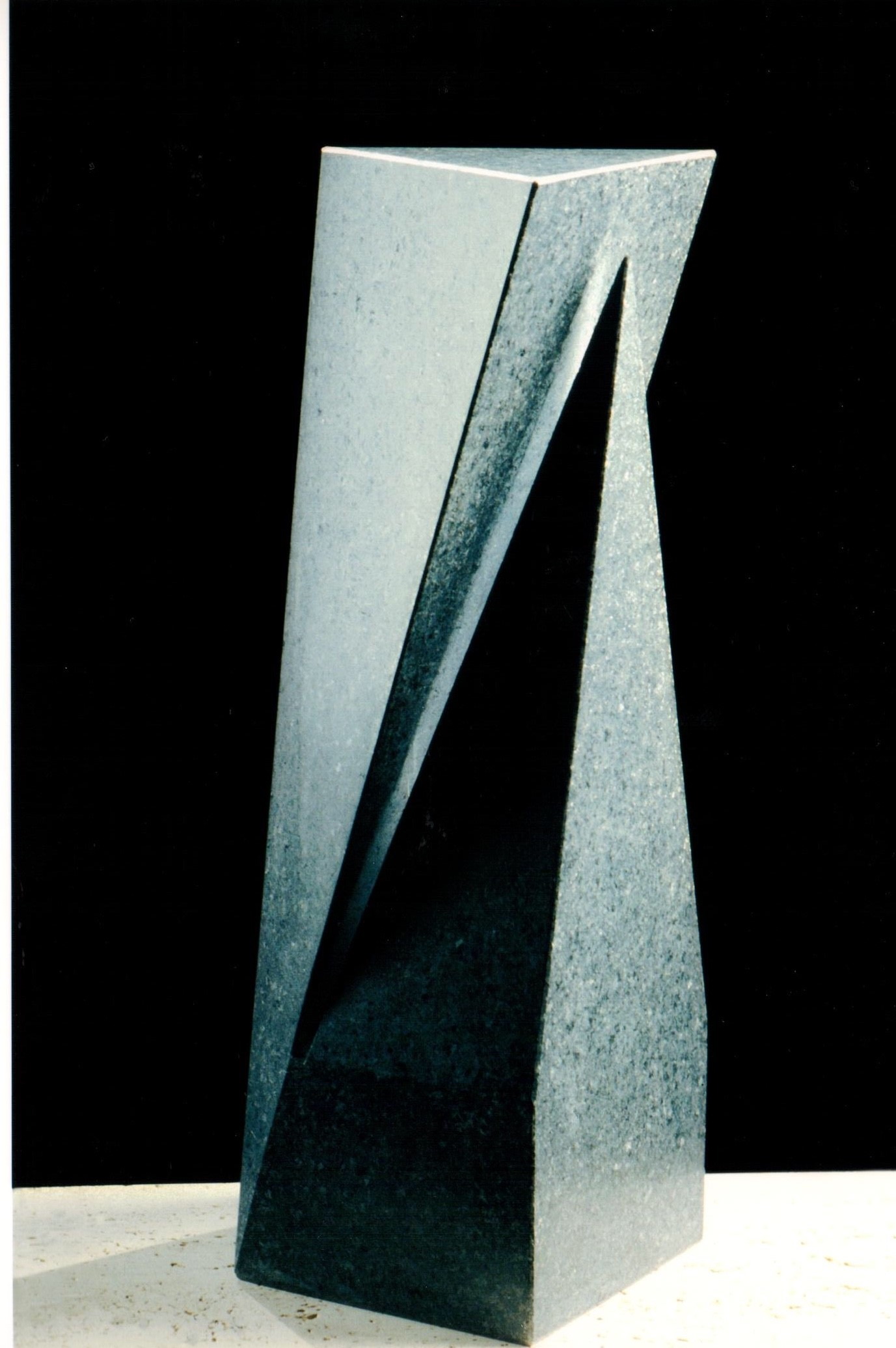 Granit 1998